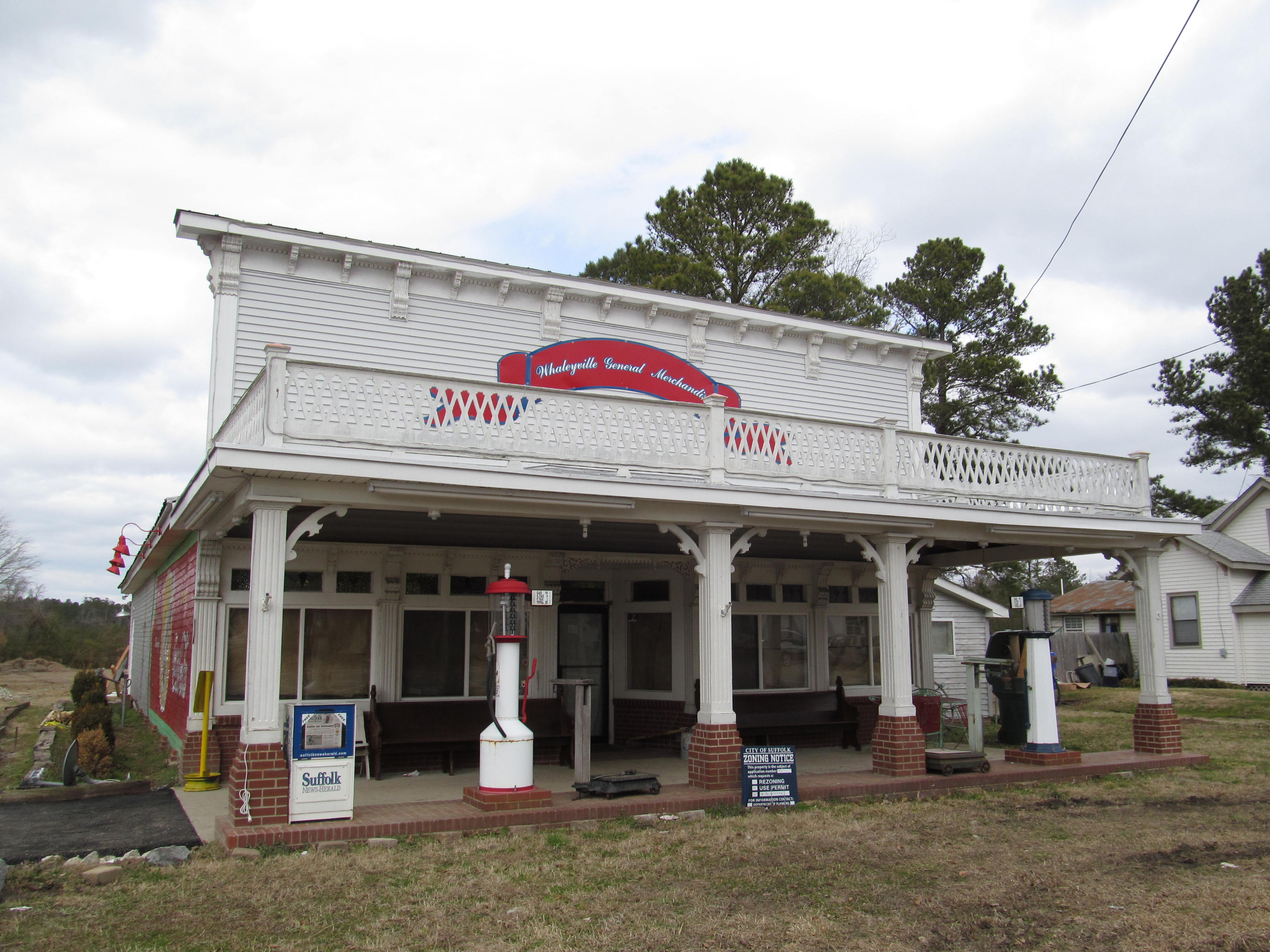 Whaleyville, Virginia